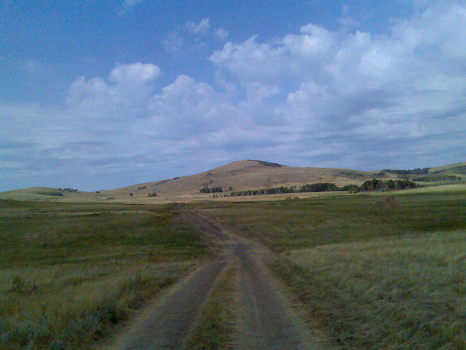 Гора Чека